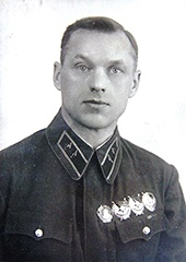 Комдив Константин Константинович Рокоссовский